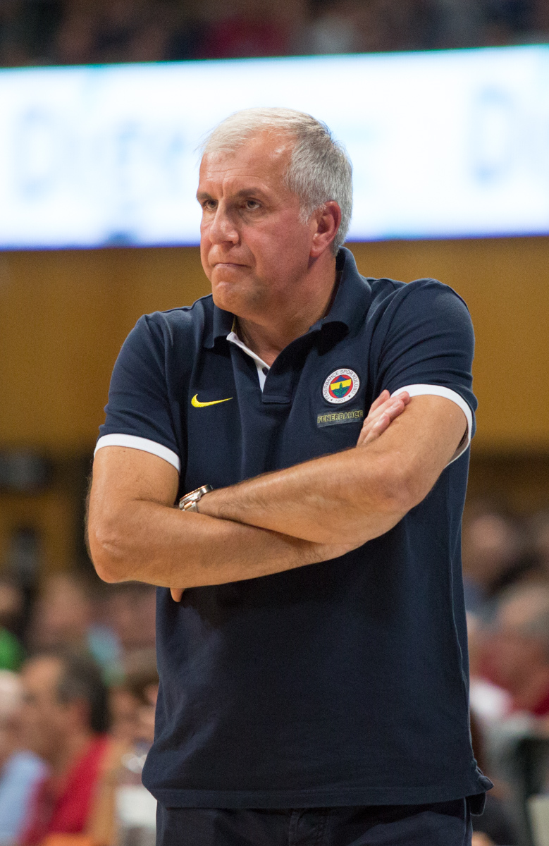 Željko Obradović entrenando al Fenerbahçe Ülkerspor en un partido amistoso el 18 de septiembre de 2016 en Badalona contra el Joventut.